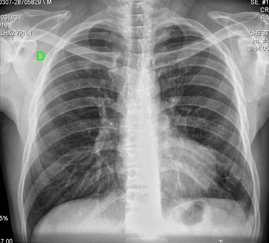 Rx de tórax PA, las imágenes lineales que se observan en el sector lateral derecho del cuello y el tórax superior corresponden al cabello del paciente.